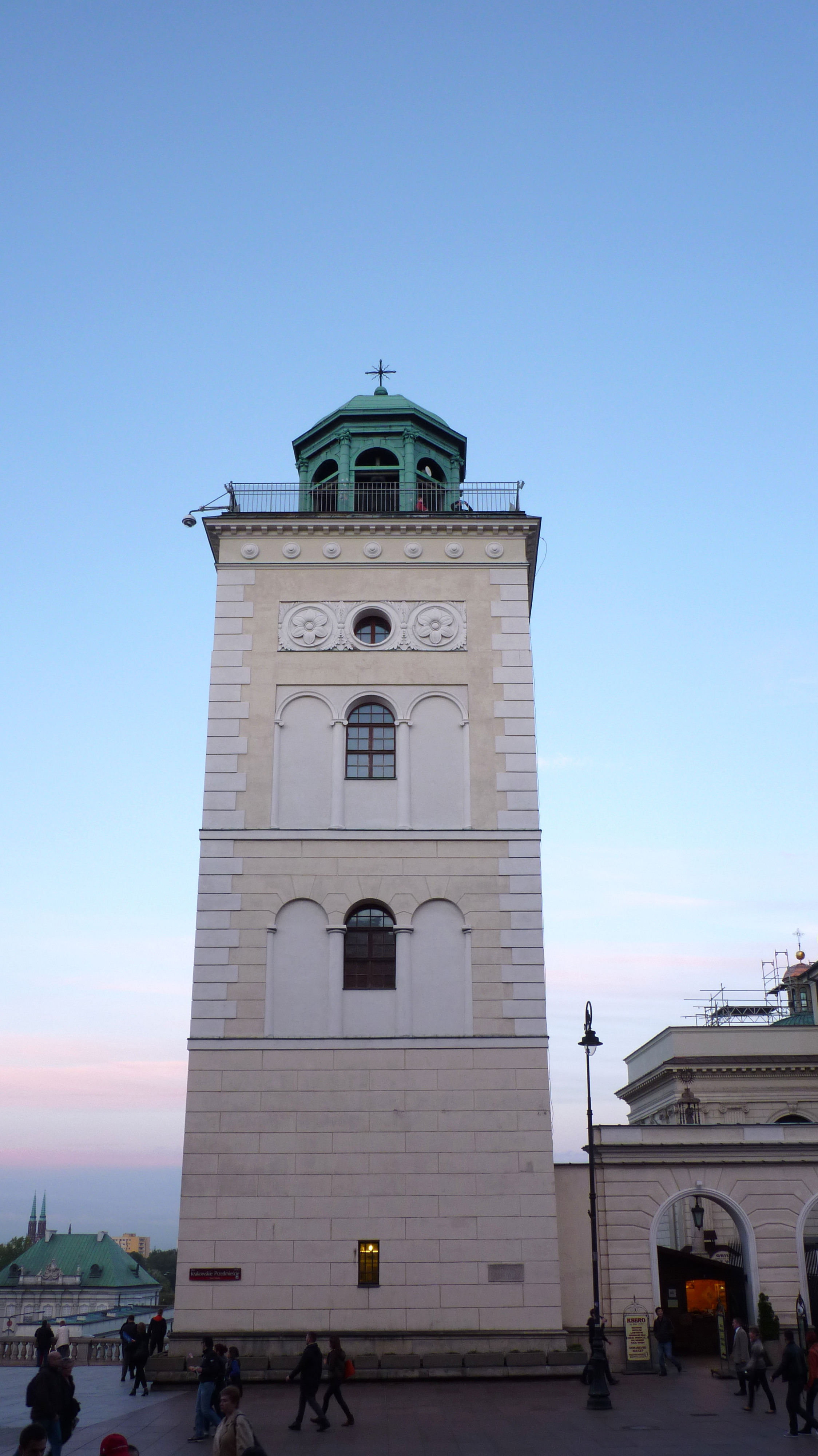 Warszawa, dzwonnica, 1578-1584, po 1660, 1819-1821